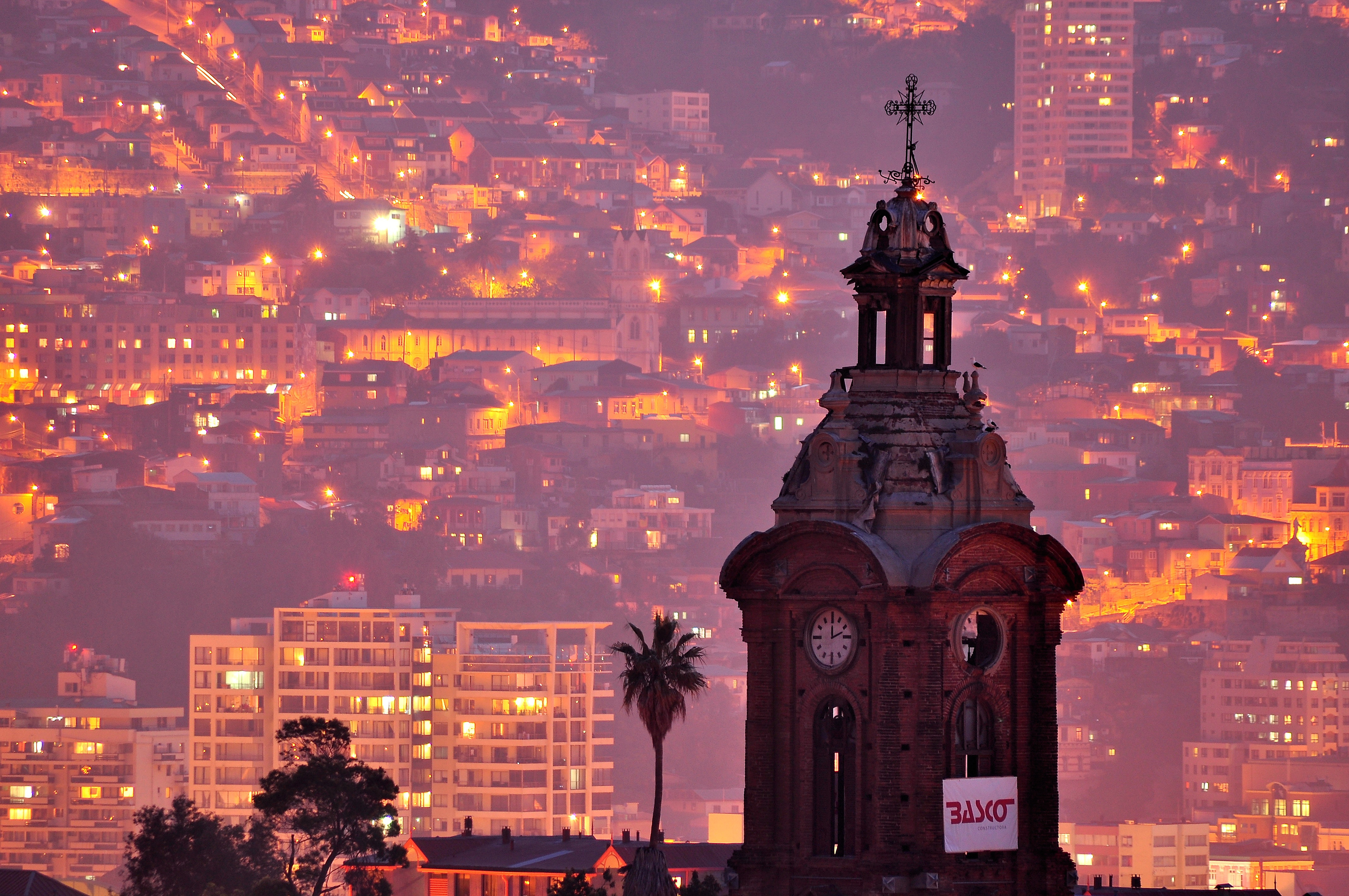 Tomada desde el cerro Los Placeres This is a photo of a national monument in Chile: 763